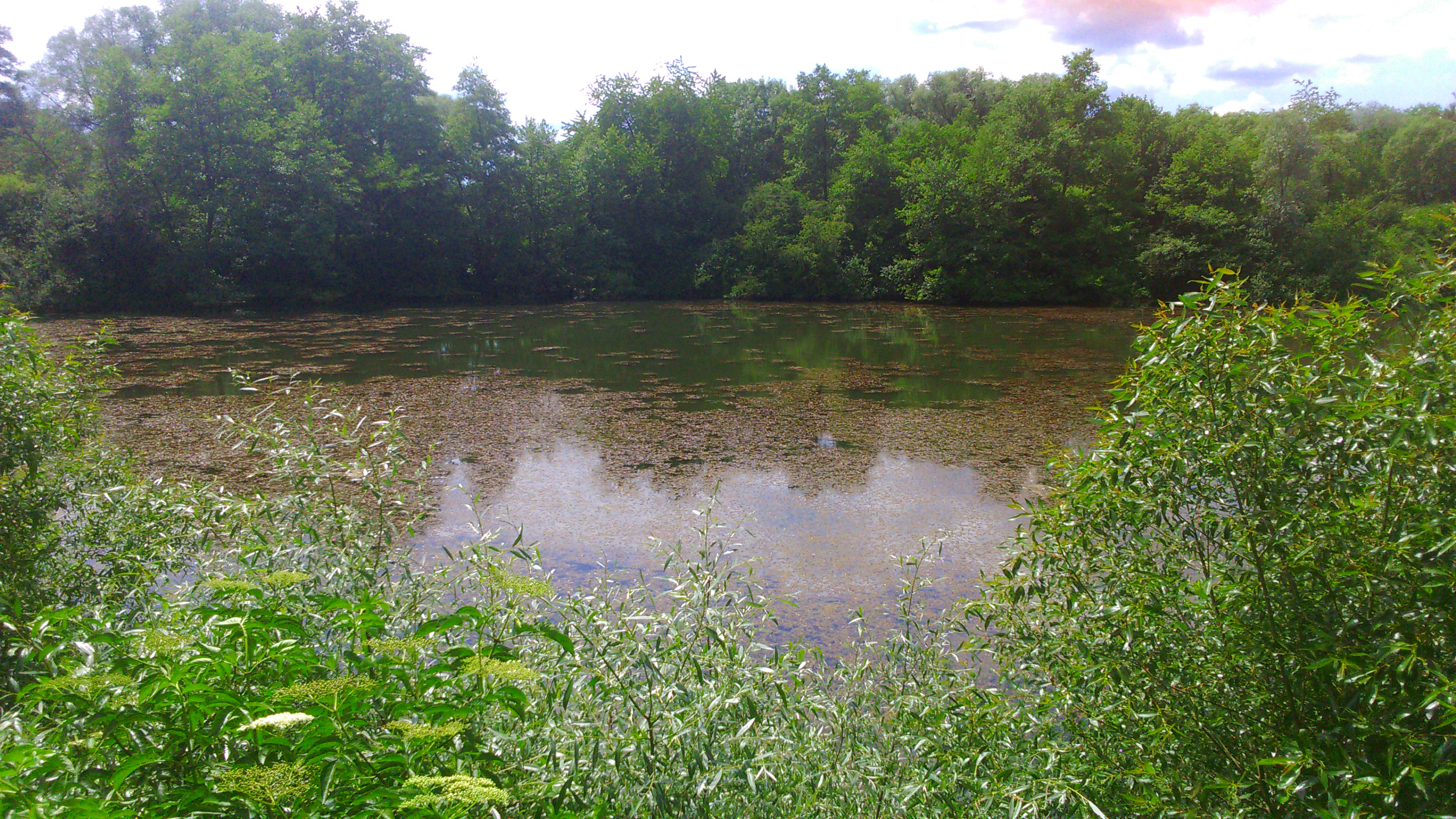 RNR basse vallée de la savoureuse